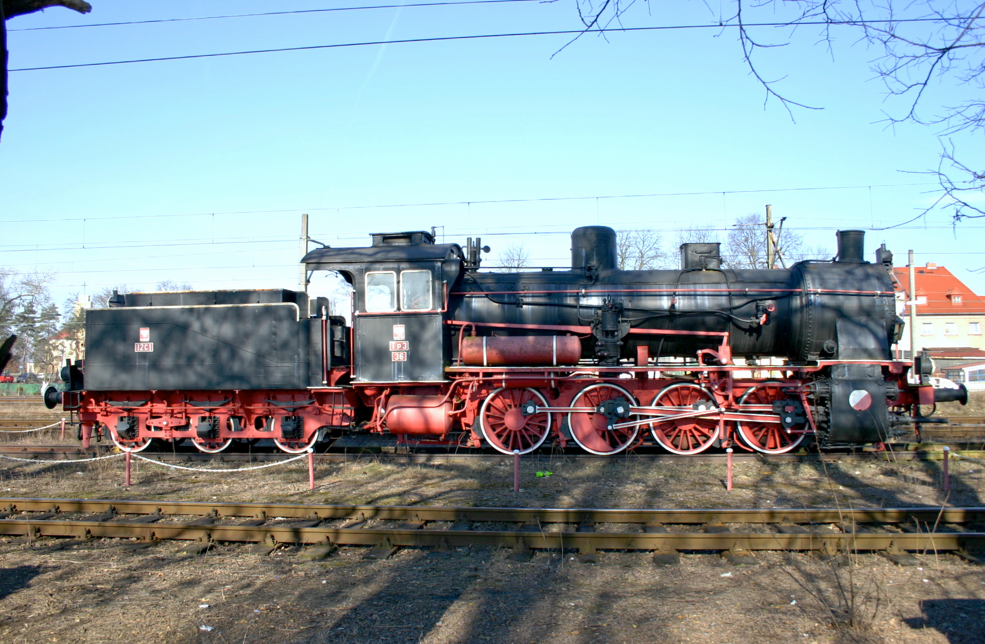 Dampflokomotive Tp 3-36 Zbaszynek